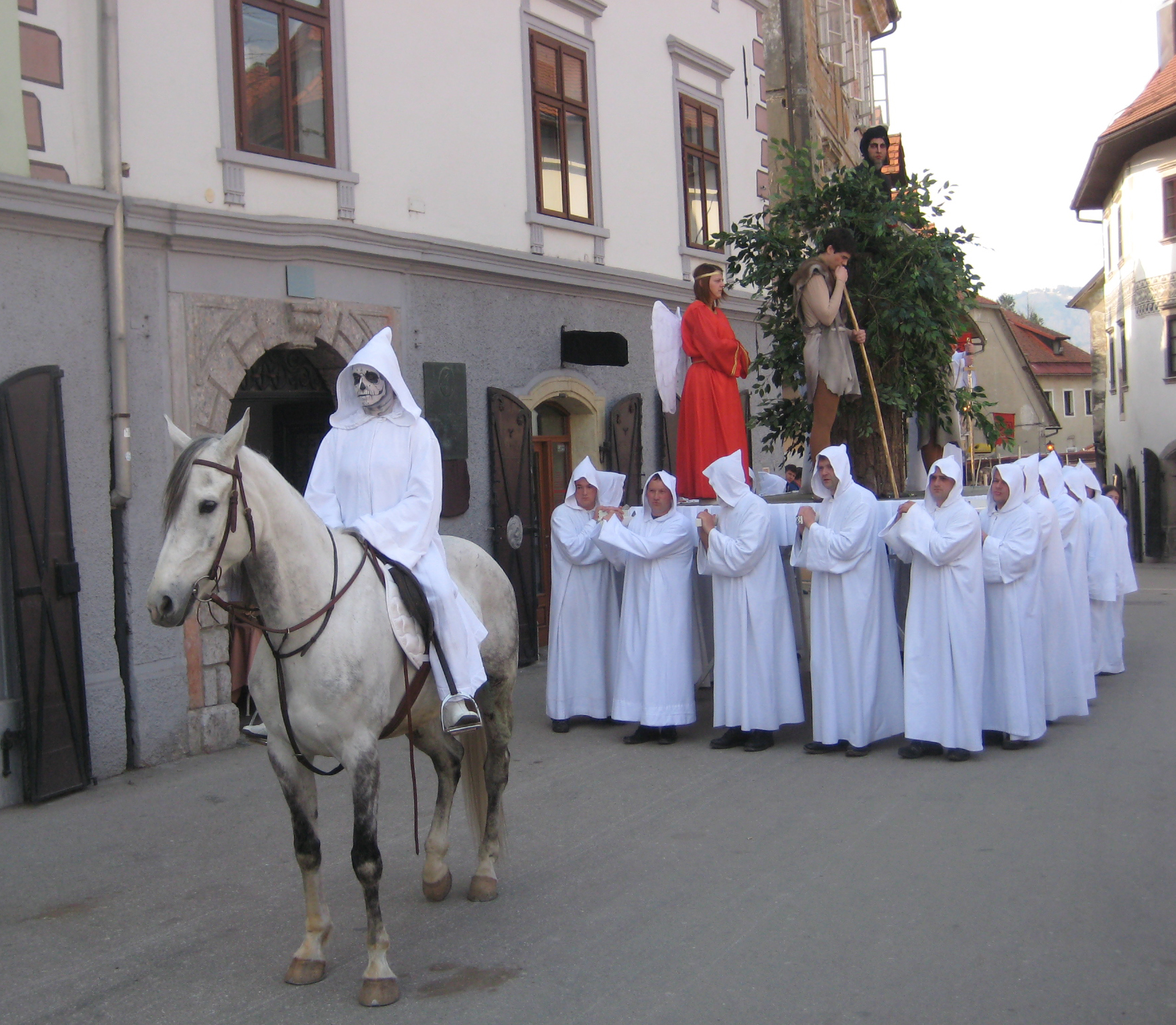 Škofjeloški pasijon (Processio Locopolitana), izvedba 2009 v Škofji Loki